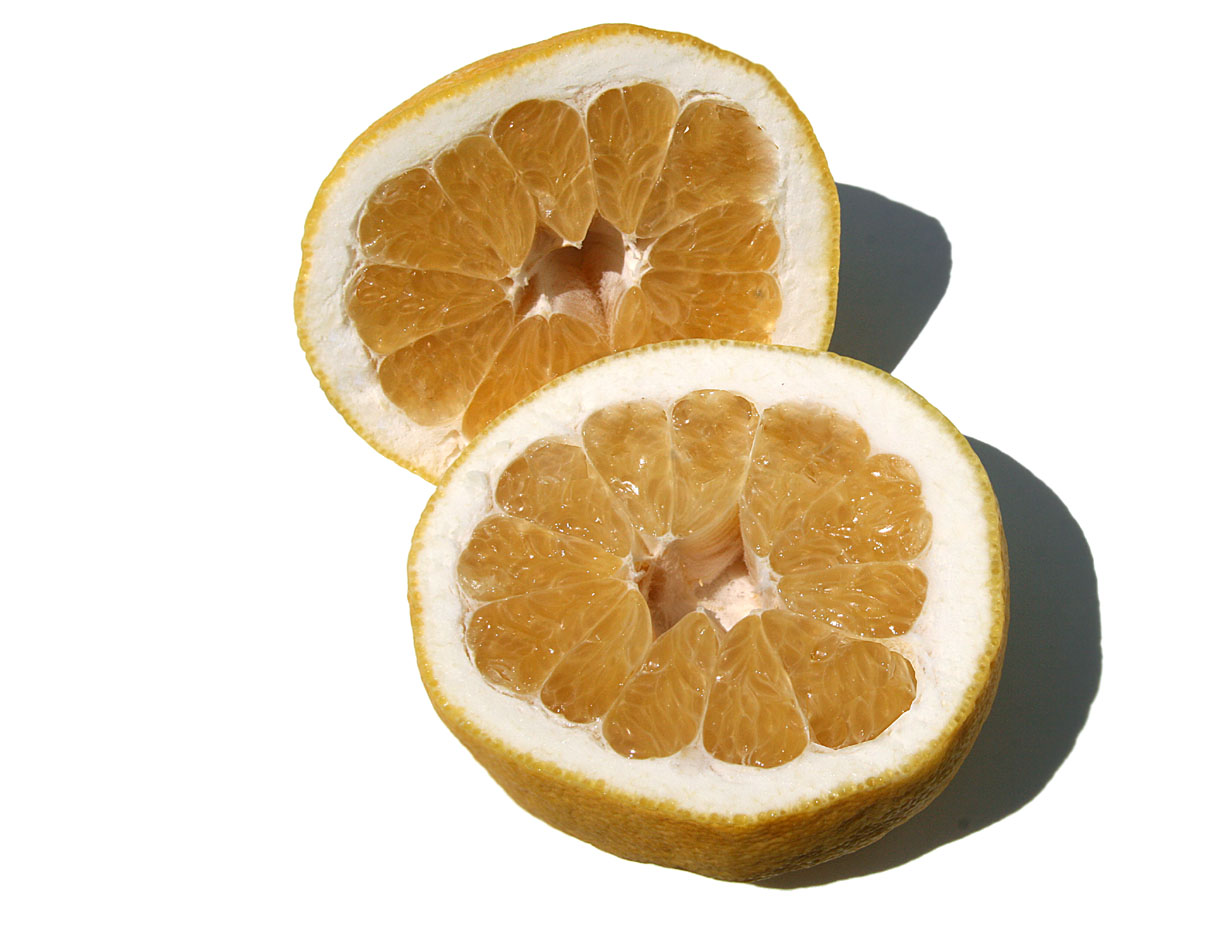 Kawachi bankan en coupe : fruits sans graine